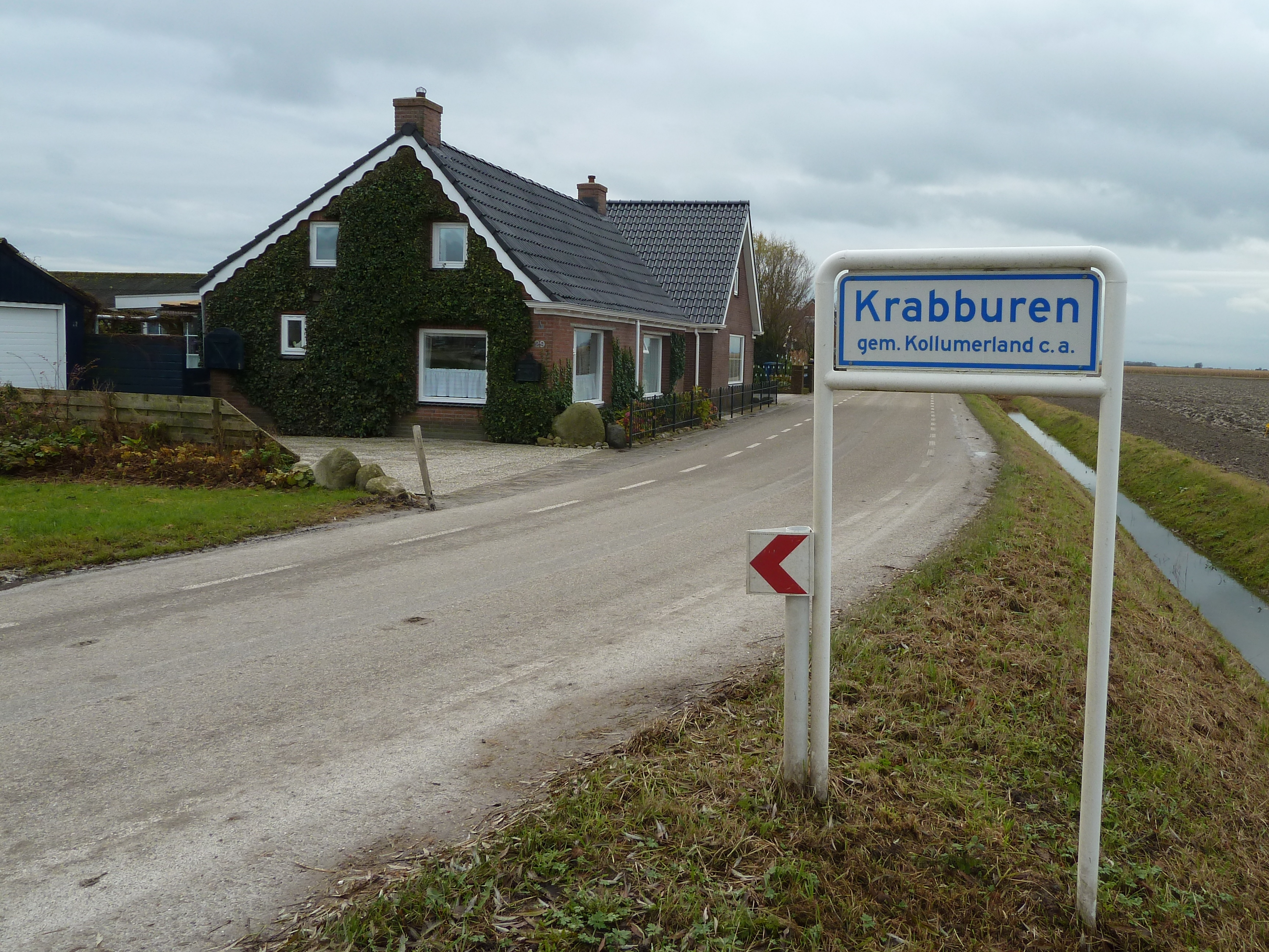 Naambordje van het buurtschap Krabburen in de Friese gemeente Kollumerland en Nieuwkruisland, gezien vanaf de richting Munnekezijl.